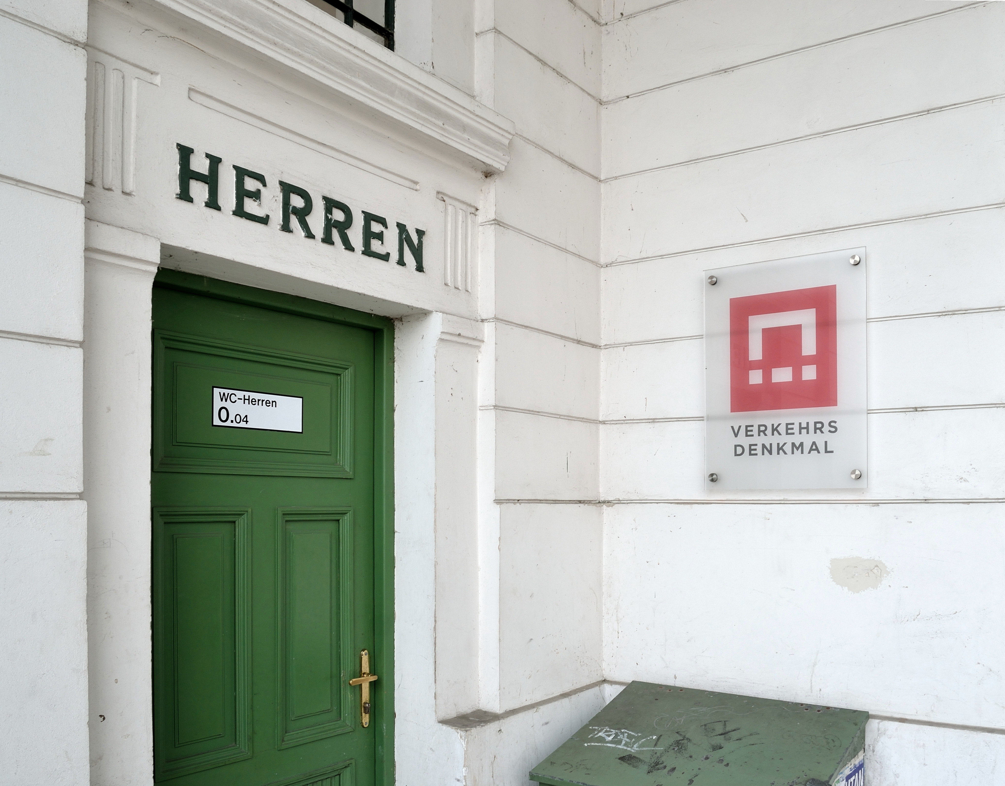 Schild Verkehrsdenkmal an der U-Bahn Station Schönbrunn.